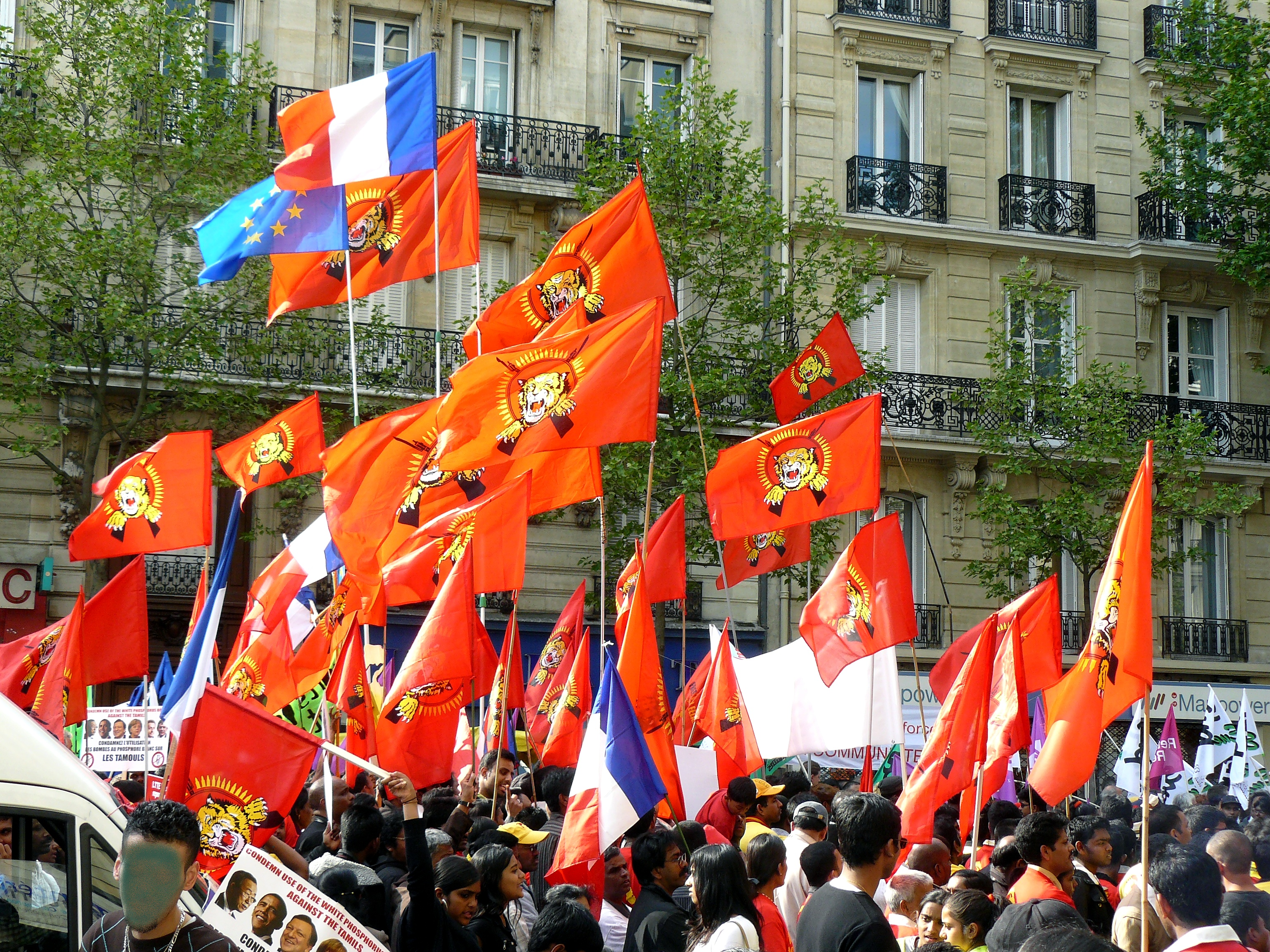 Manifestation de la communauté tamoule de Paris, arborant le drapeau des Tigres de libération de l'Îlam tamoul, dans le cortège du défilé du 1er mai 2009 à Paris.